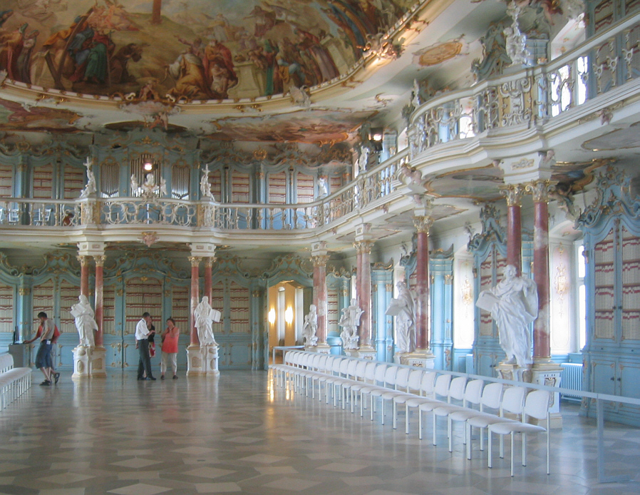 Bad Schussenried, Kloster Schussenried, Bibiothekssaal